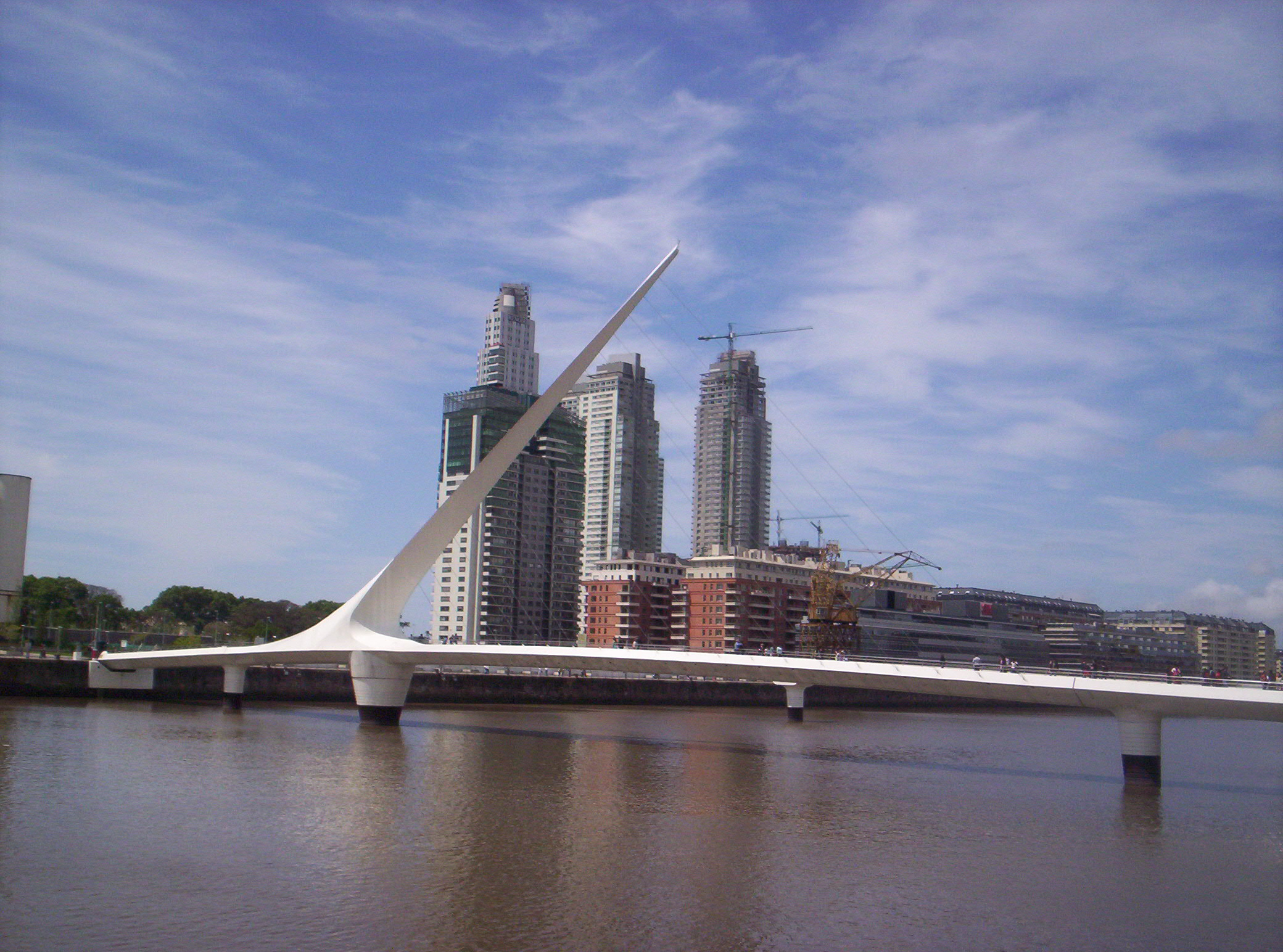 Puente de la Mujer, Puerto Madero, Buenos Aires, Argentina.